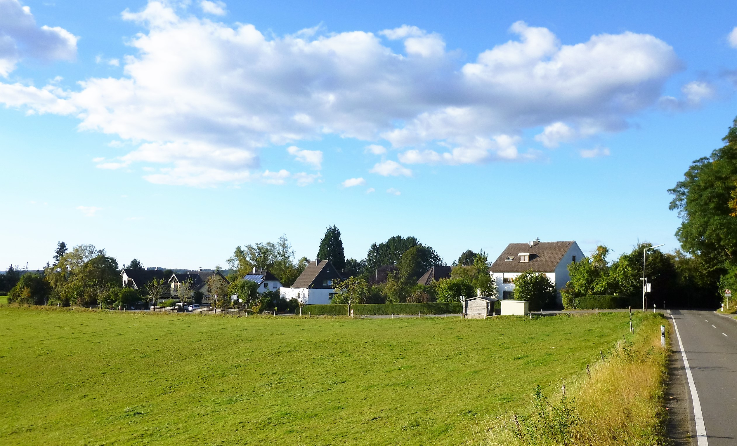 Hintersteimel